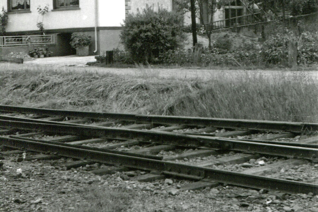 Schienenweiche am ehemaligen Bahnhof Lösnich-Kinheim 1963.